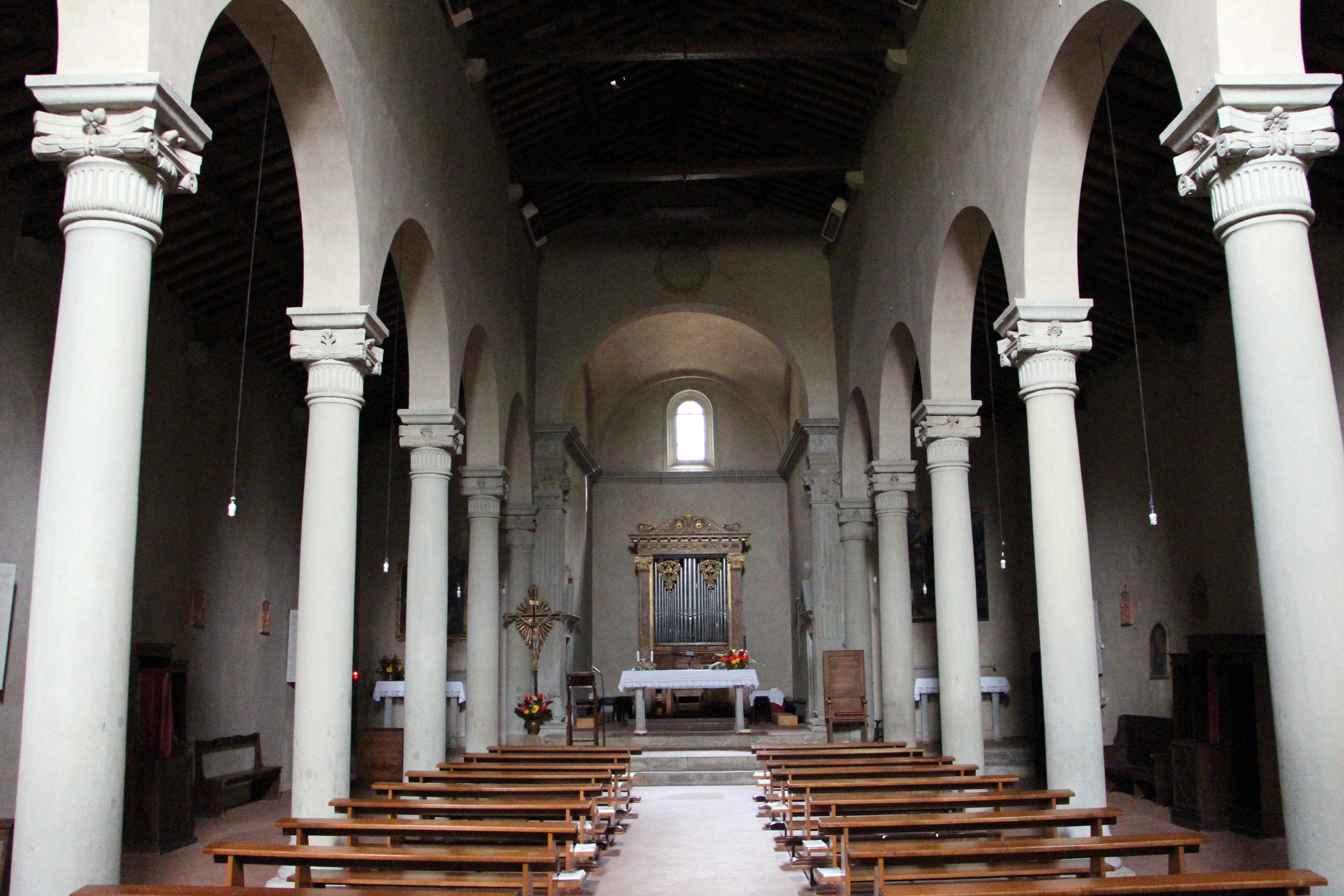 Vaglia (FI)